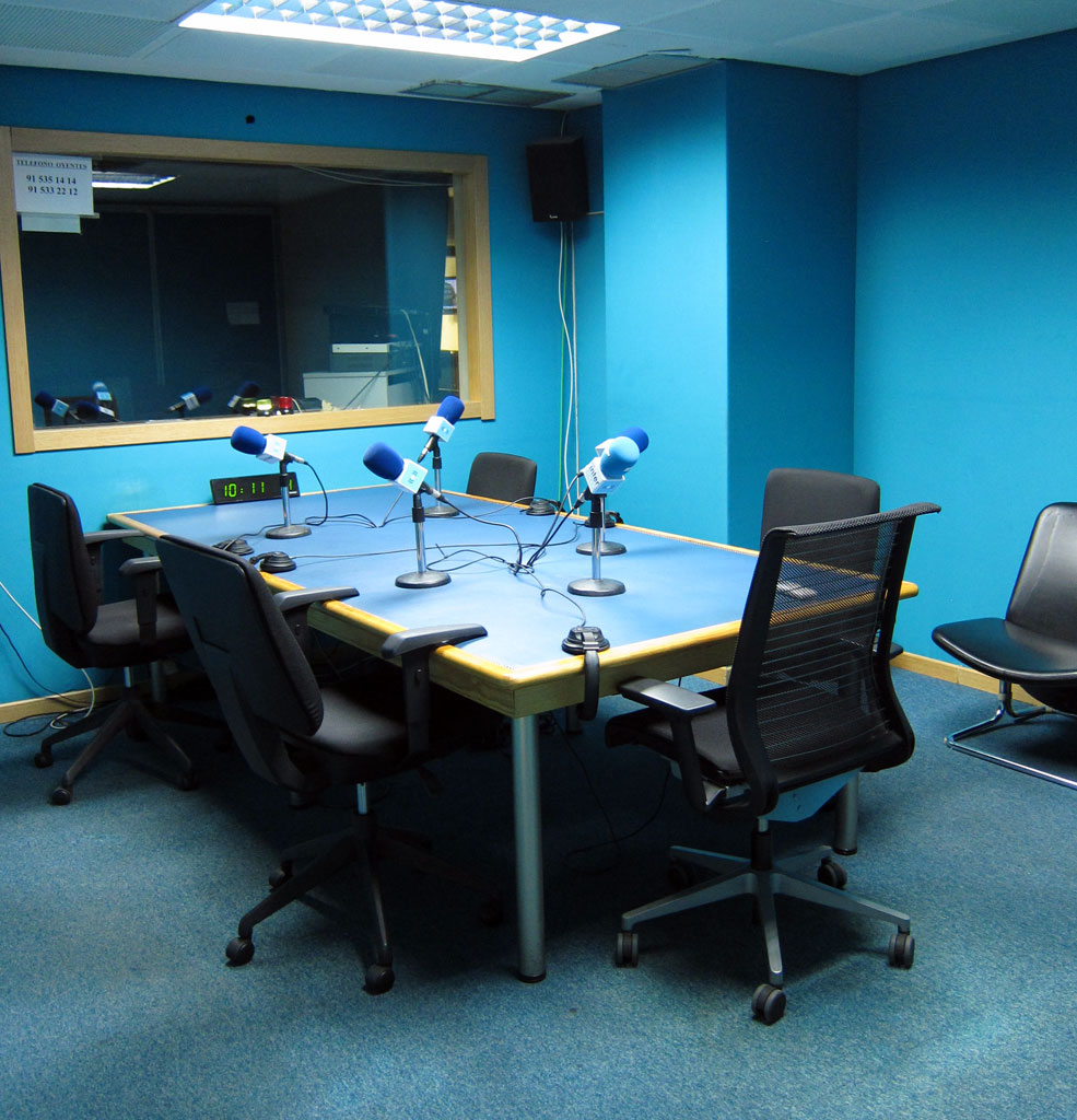 Estudio de Radio Inter en la sede central de Madrid